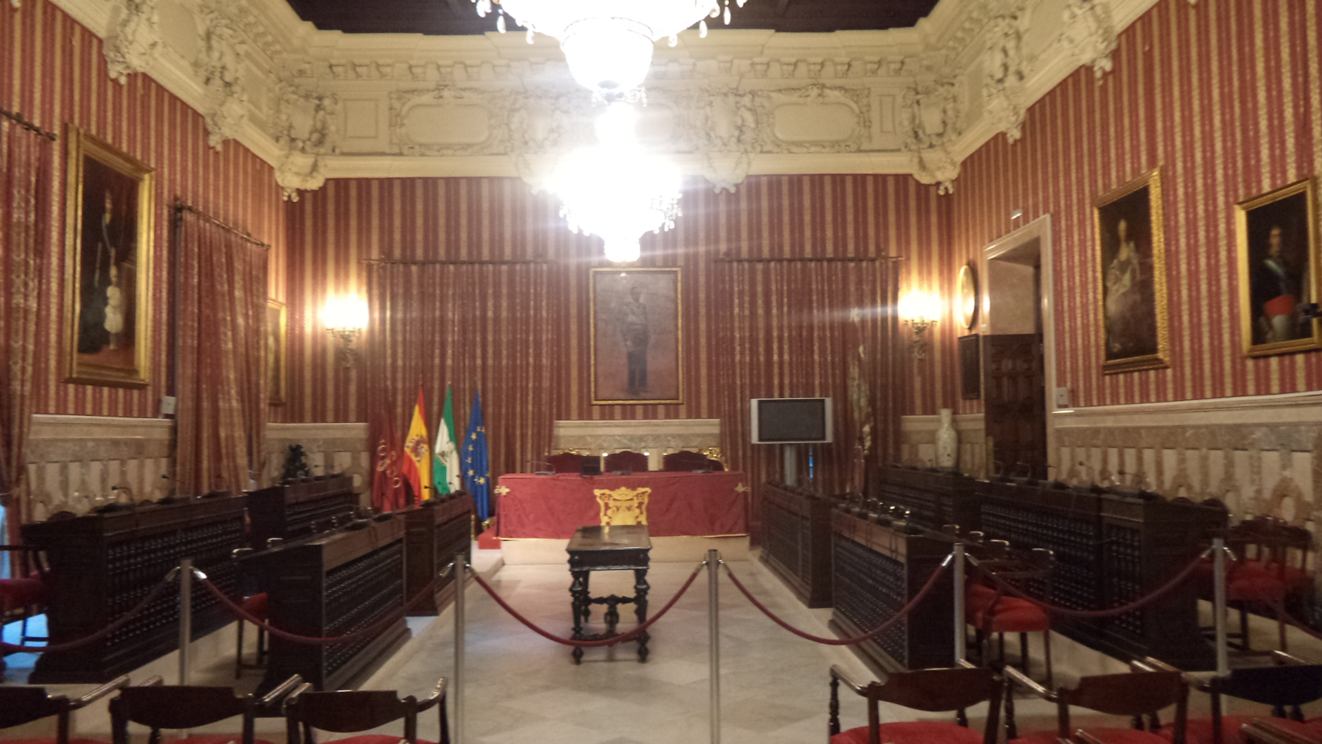 Salón Colón del Ayuntamiento de Sevilla, que sirve como salón de plenos. El nombre se debe a un retrato de Colón realizado en 1892 y que antes estaba situado en esta sala. En la actualidad en retrato de Colón está en una galería de la primera planta. El Salón Colón tiene retratos de los borbones españoles, razón por la cual ha sido llamado también Salón de los Borbones.